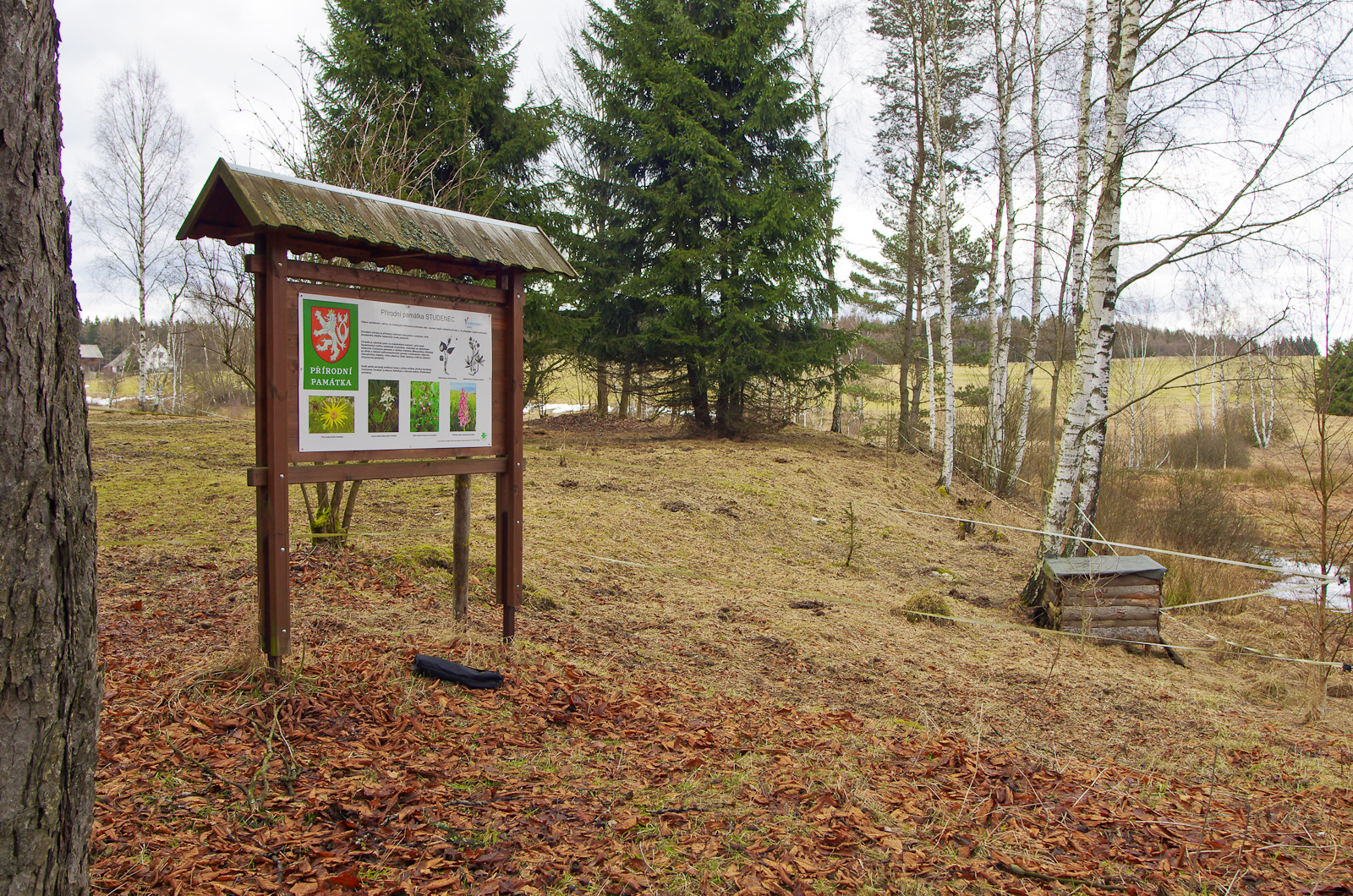 Přírodní památka Studenec, na okraji Horního Studence u Oloví, Krušné Hory, okres Sokolov